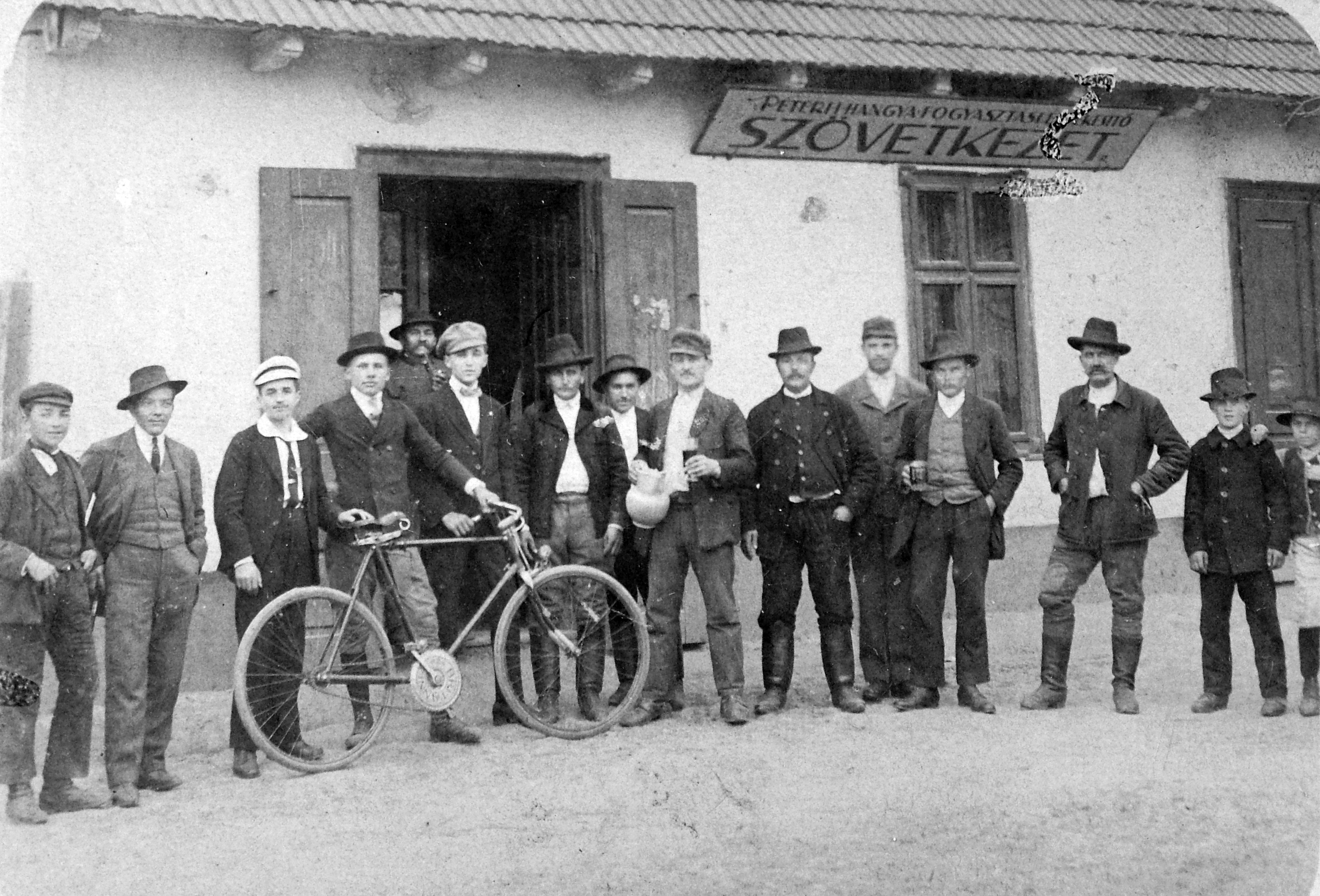 Hangya Fogyasztási Értékesítő Szövetkezet. Location: Hungary Tags: bicycle, Premier-brand, Gerrman brand, tableau, Cooperation of Hangya Unions Title: Hangya Fogyasztási Értékesítő Szövetkezet.